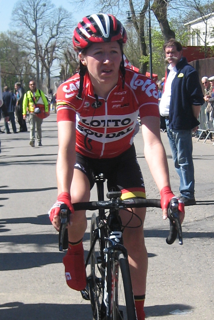 Sofie De Vuyst (Lotto Soudal Ladies) na finish Waalse Pijl 2016